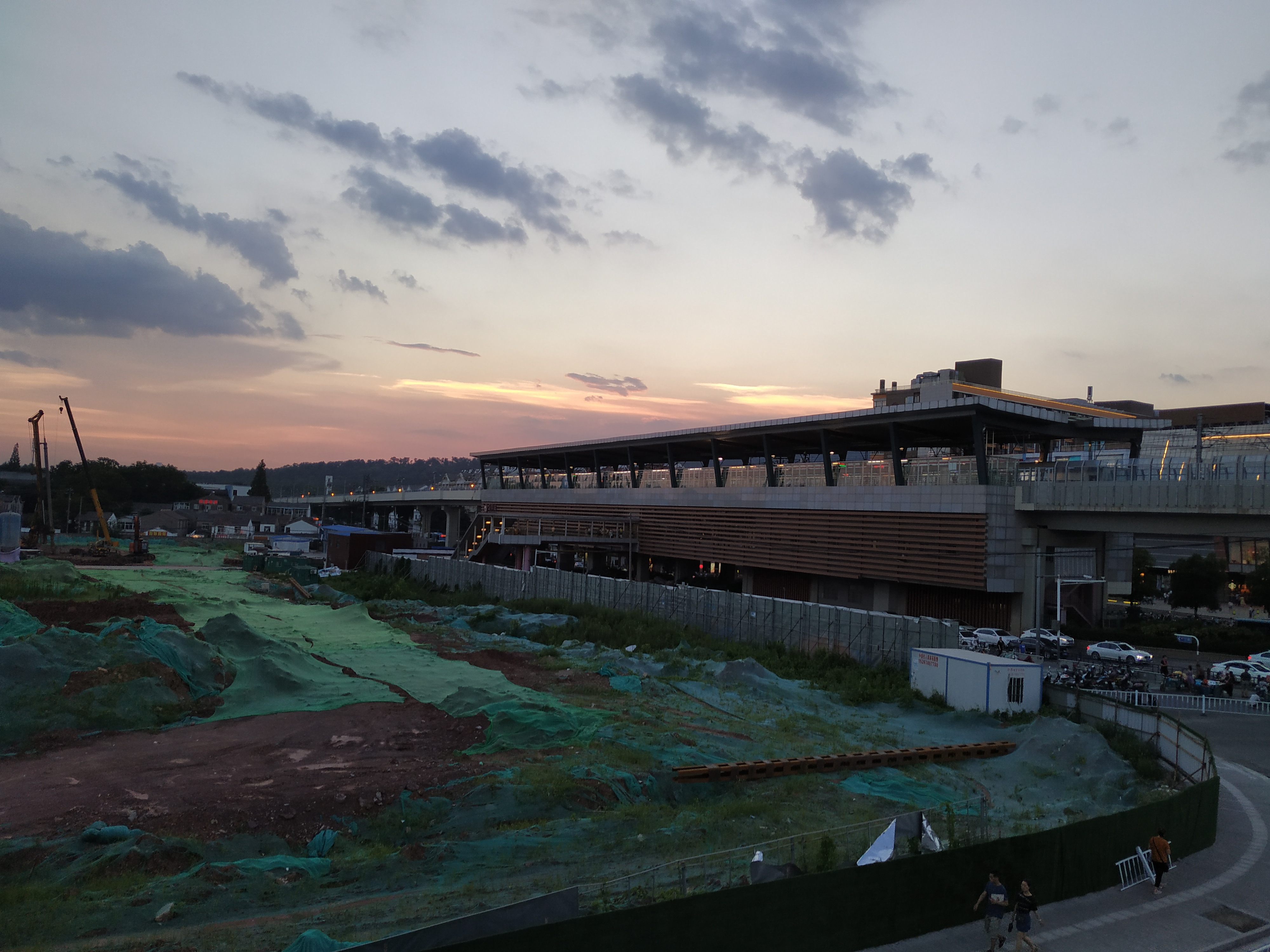 晚霞之下的马群地铁站